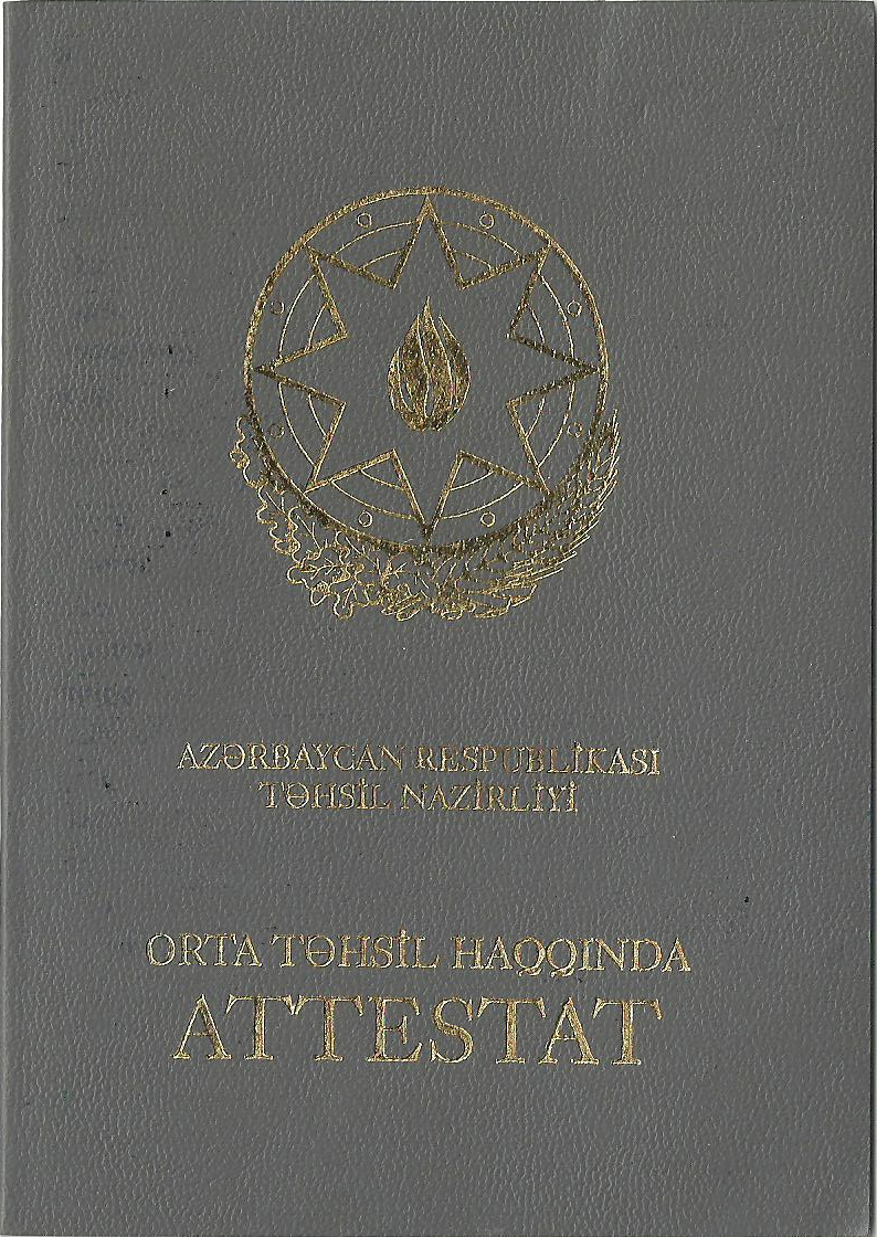 Azərbaycan Respublikası Təhsil Nazirliyi - Orta təhsil haqqında Attestat